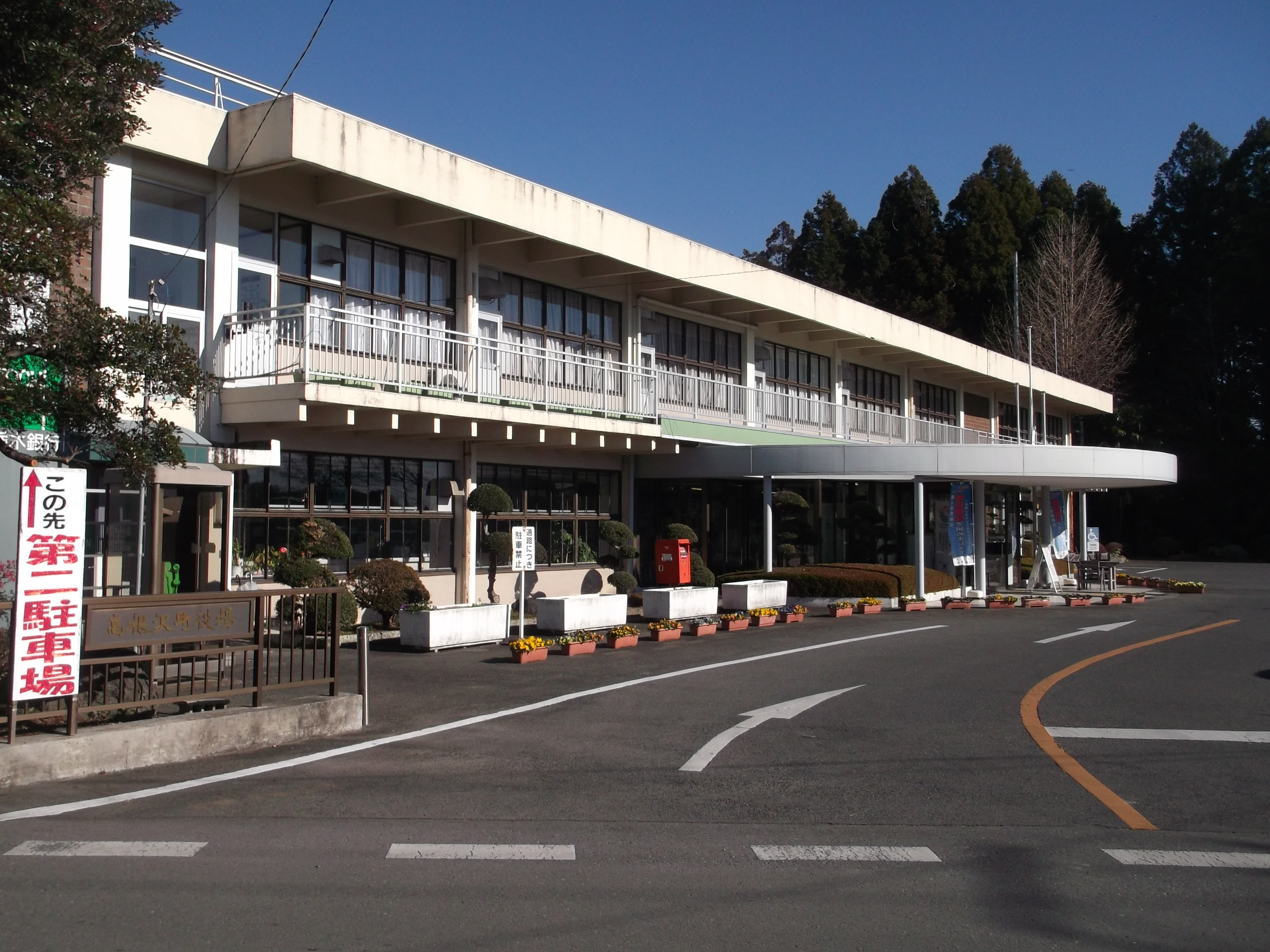 栃木県塩谷郡高根沢町役場